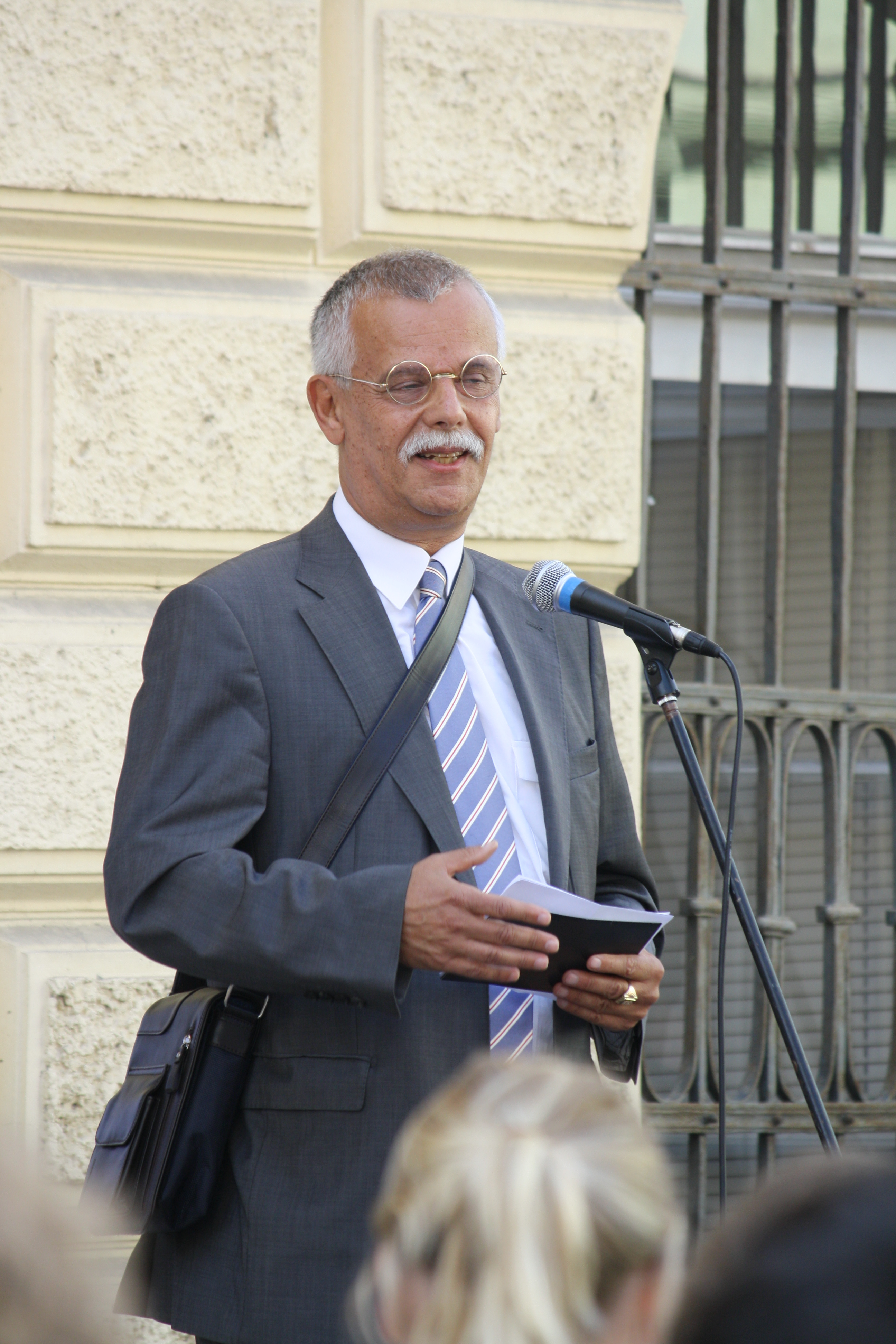 Ve čtvrtek 1. září 2011 přišly demonstrovat před ministerstvo školství odhadem dvě až tři stovky lidí proti působení Ladislava Bátory na úřadu. Protestní akci pořádala ve spolupráci s nevládními organizacemi Strana zelených. Její předseda Ondřej Liška varoval před růstem pravicového extremismu a rasismu ve společnosti a jeho pronikání do politiky. Kromě něj promluvili mimo jiné předseda Židovské obce v Praze František Bányai a iniciátor petice Ne Bátorovi Radek Matuška. Sám Bátora na chvíli vyhlédl z okna ministerstva. This photograph was taken with a DSLR from WMCZ's Camera grant.